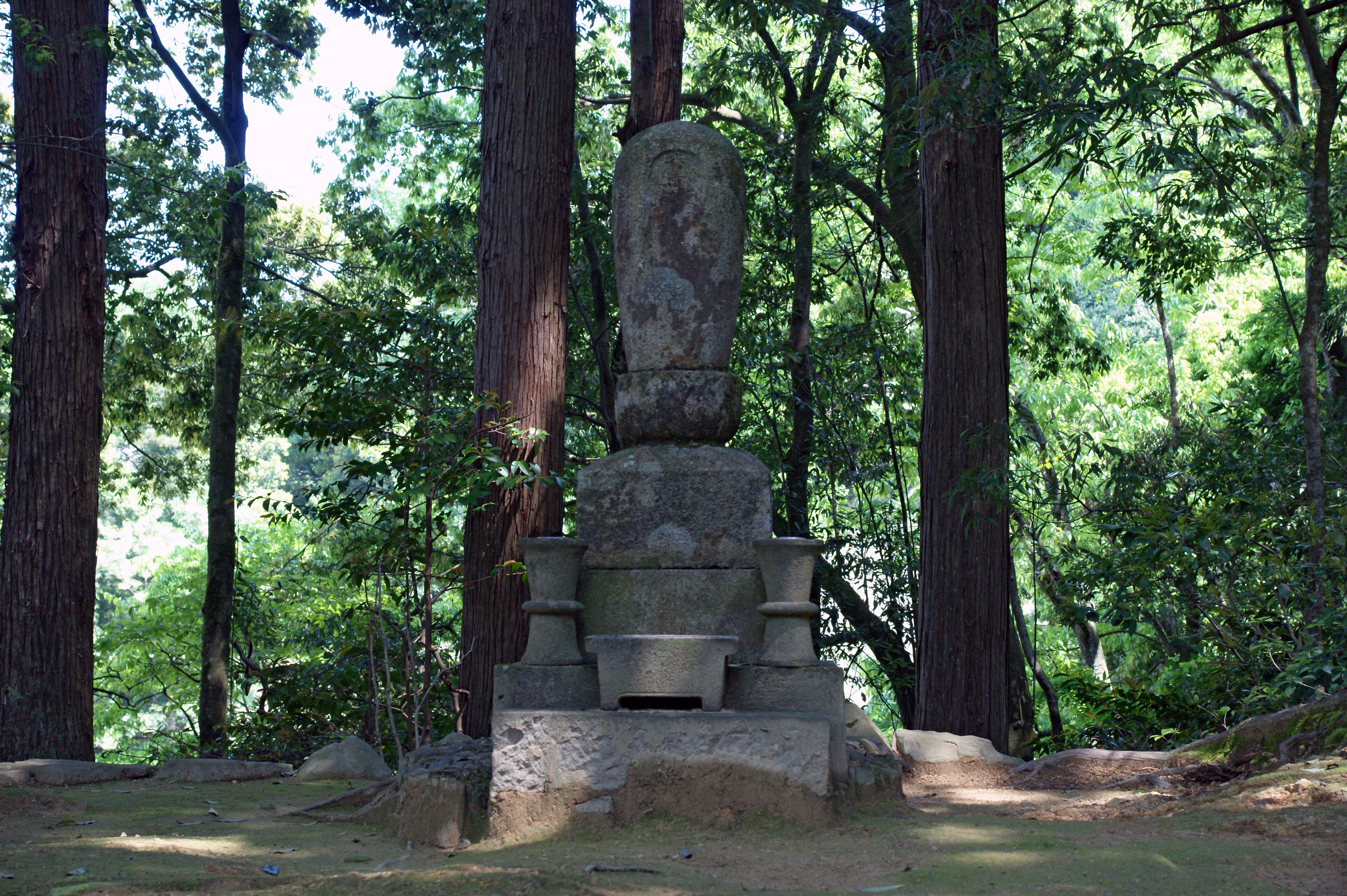 Sukyoji in Izushi, Toyooka, Hyogo prefecture, Japan